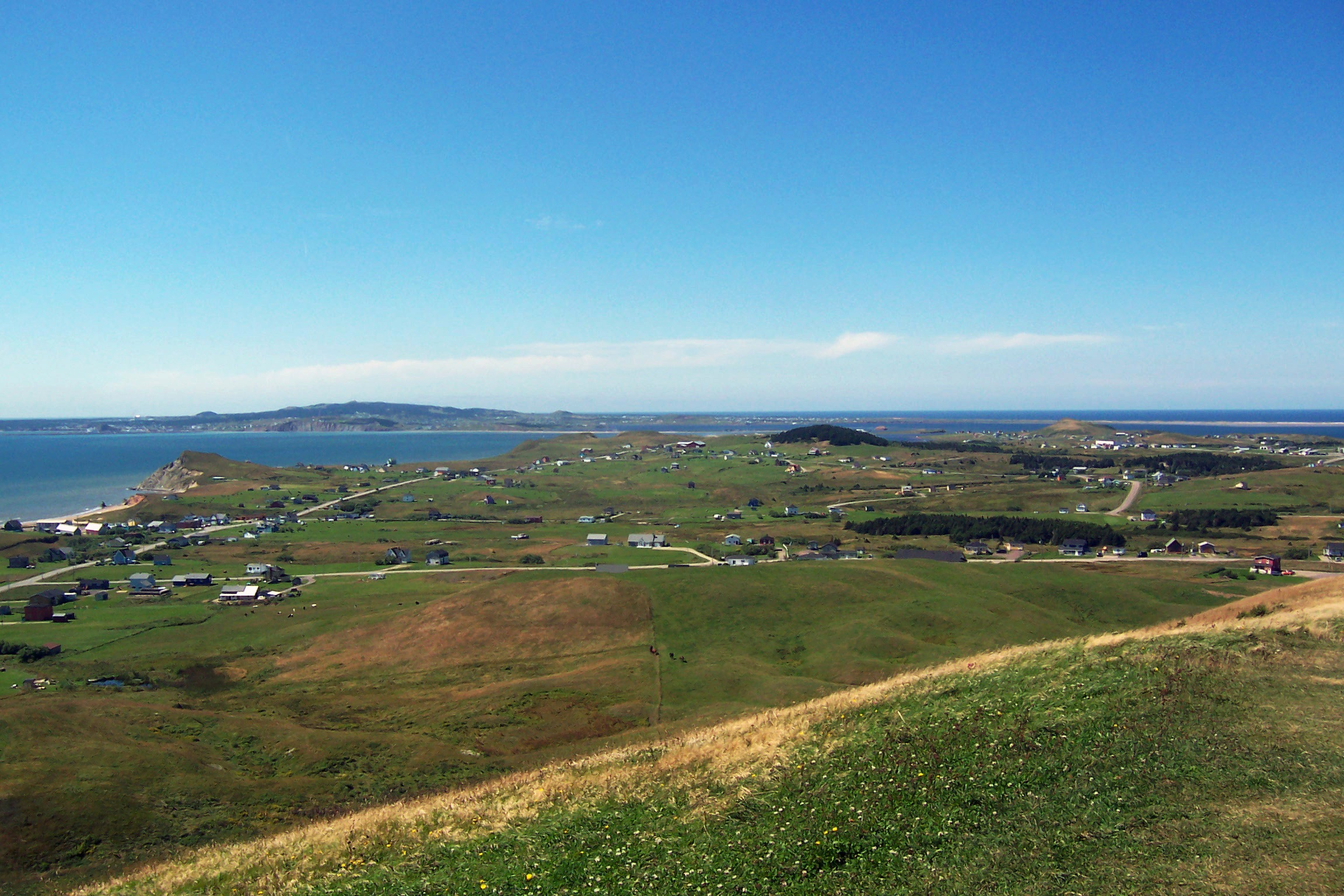 Panorama de l'île du Havre-aux-Maisons pris depuis le sommet de la Butte Ronde